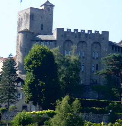 Aurillac, chateau Saint-Etienne, tour et aile construite en s'inspirant du palais des papes